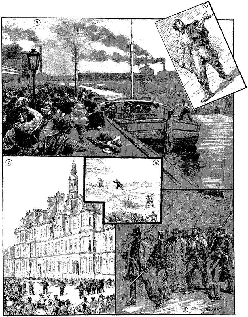 "Paris : la grève des ouvriers terrassiers (dessin d'après nature de M. Guilliod). 1. Type de gréviste ; 2. Bagarre du quai de l'Oise ; 3. Les grévistes sur la place de l'Hôtel-de-Ville ; 4. Scène dans la carrière de sable de Gennevilliers ; 5. Arrestation de cinquante-sept grévistes à Aubervilliers".